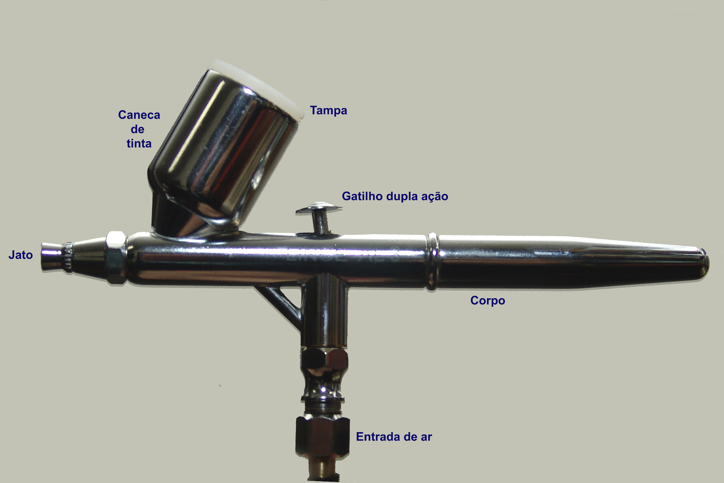 Aerógrafo Lince AL-3 - dupla ação, gravidade - comprimento 13m centímetros